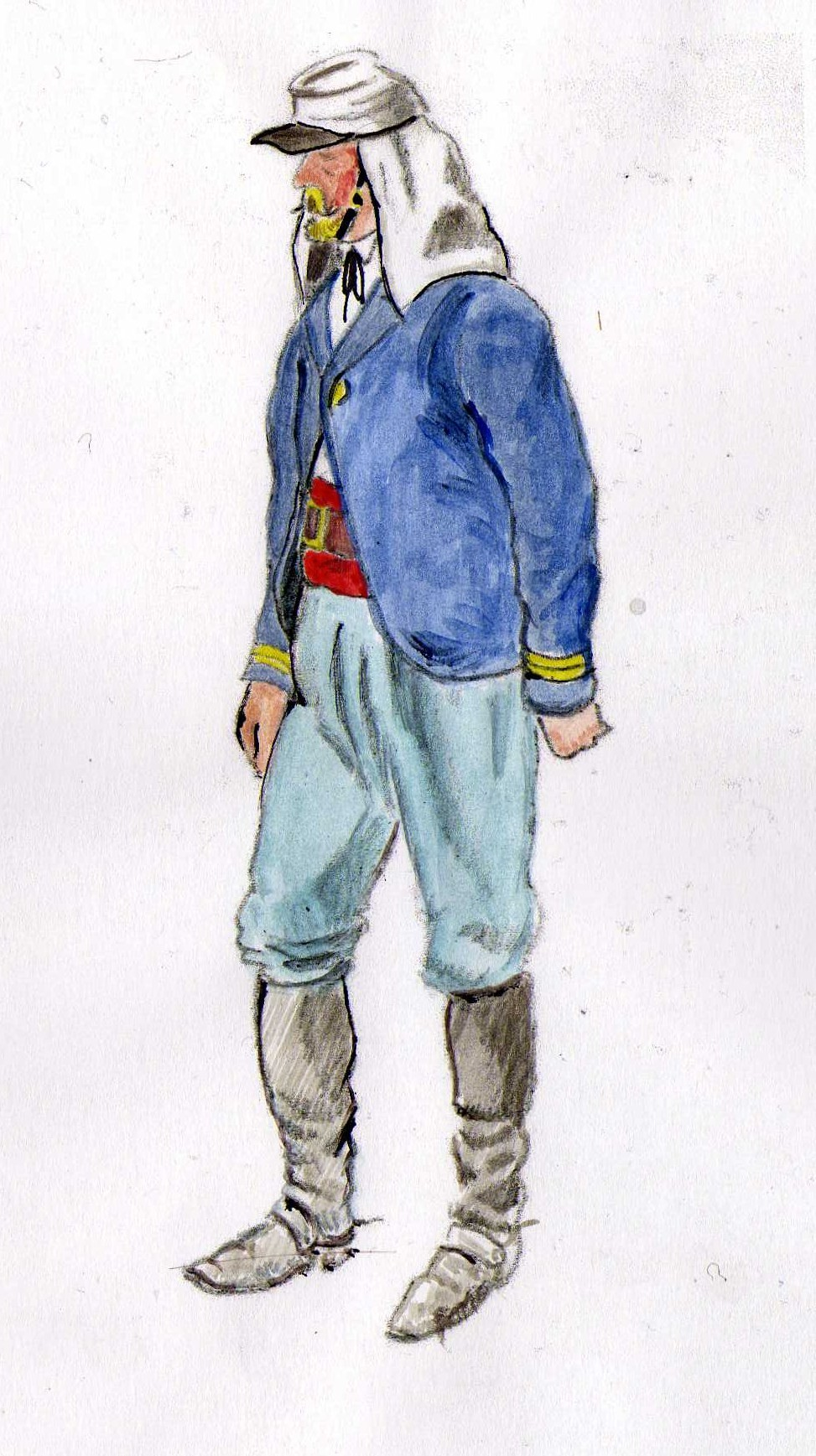 Légion belge. Sous-lieutenant en campagne. Mexique 1865-1867. (d'après une planche de Patrice Courcelle)